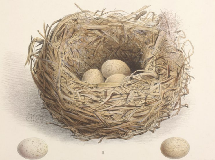 Nest der Laysanralle (Porzana palmeri).